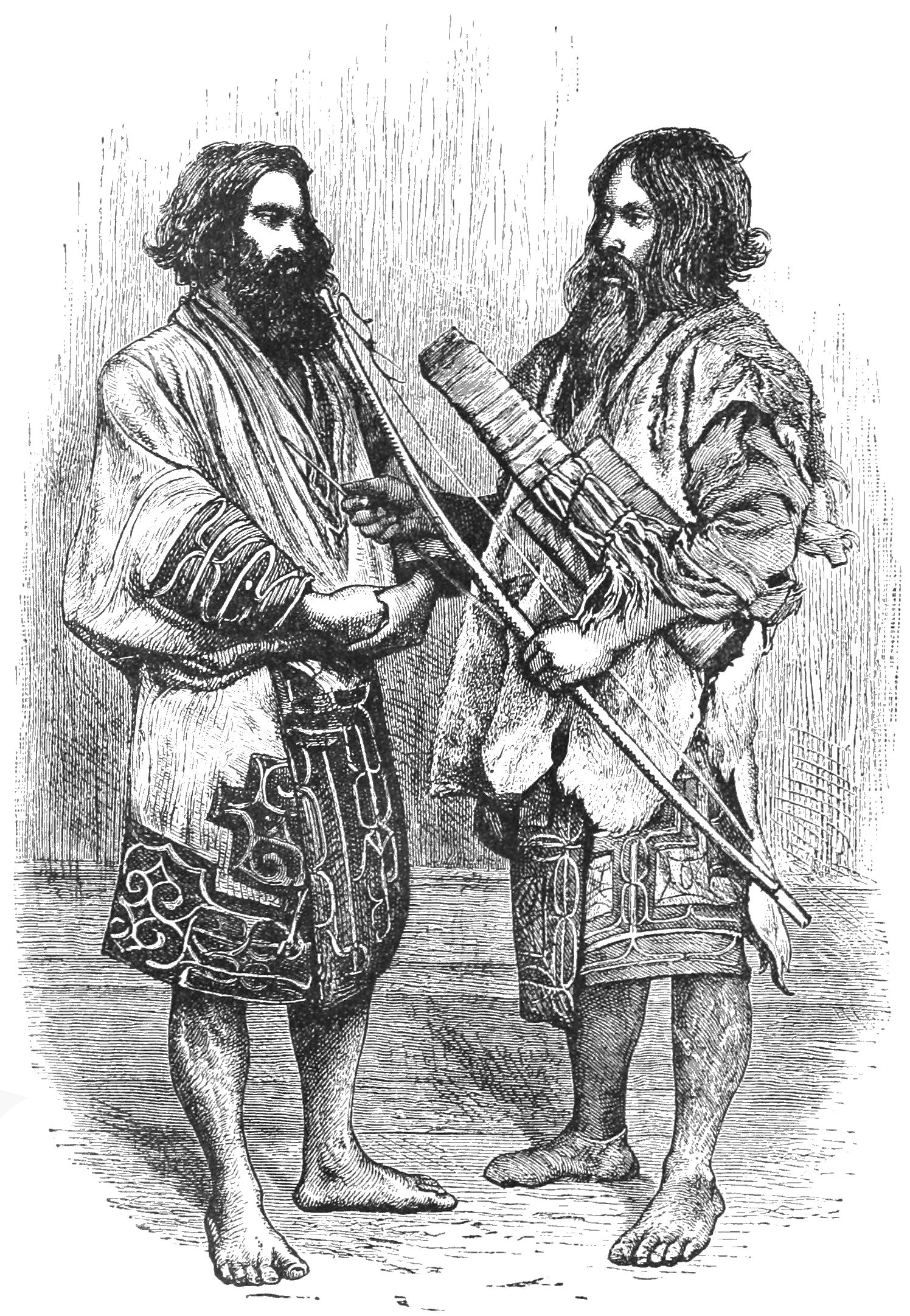 Ainu of Yezo